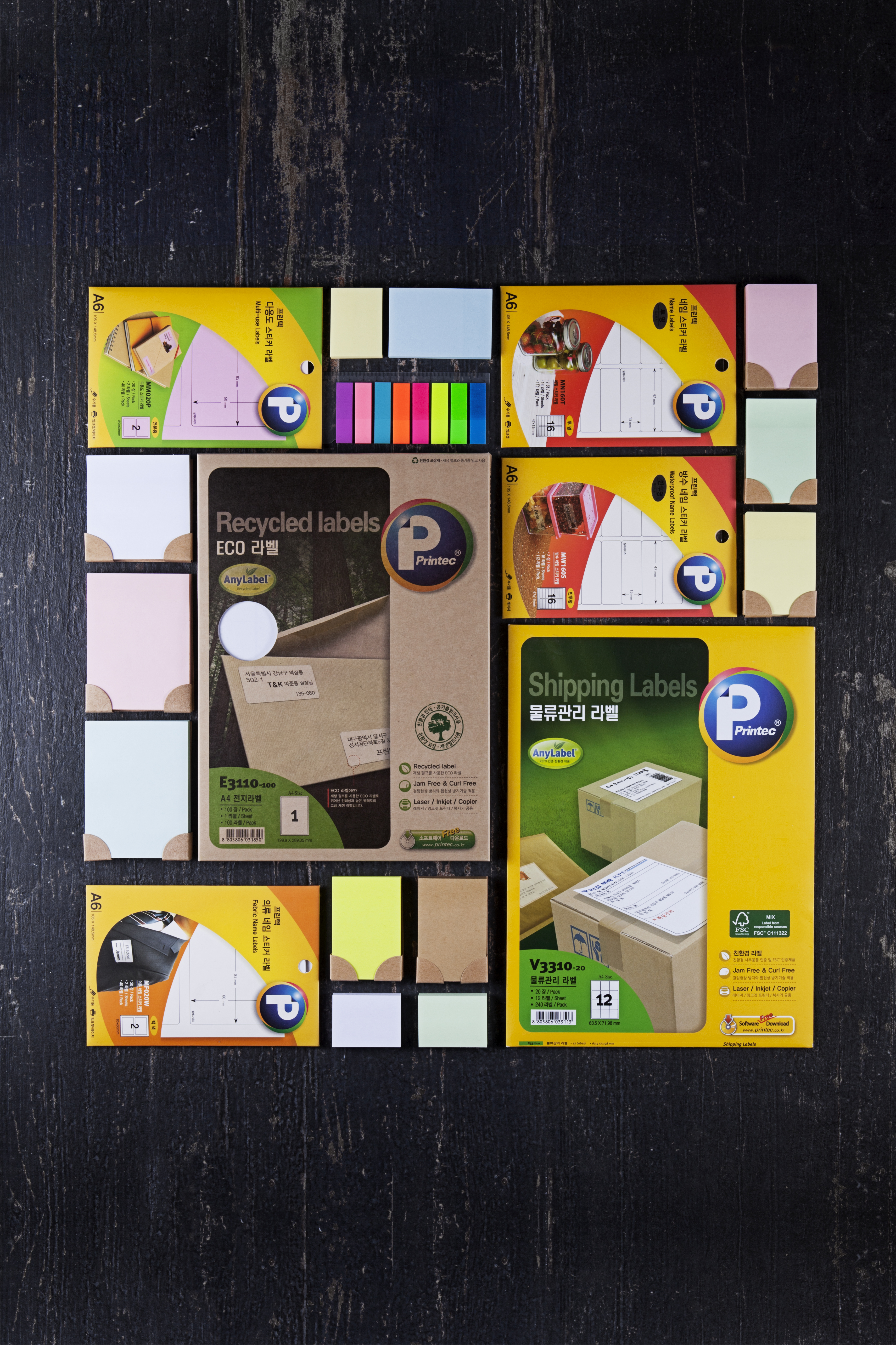 프린텍 이미지